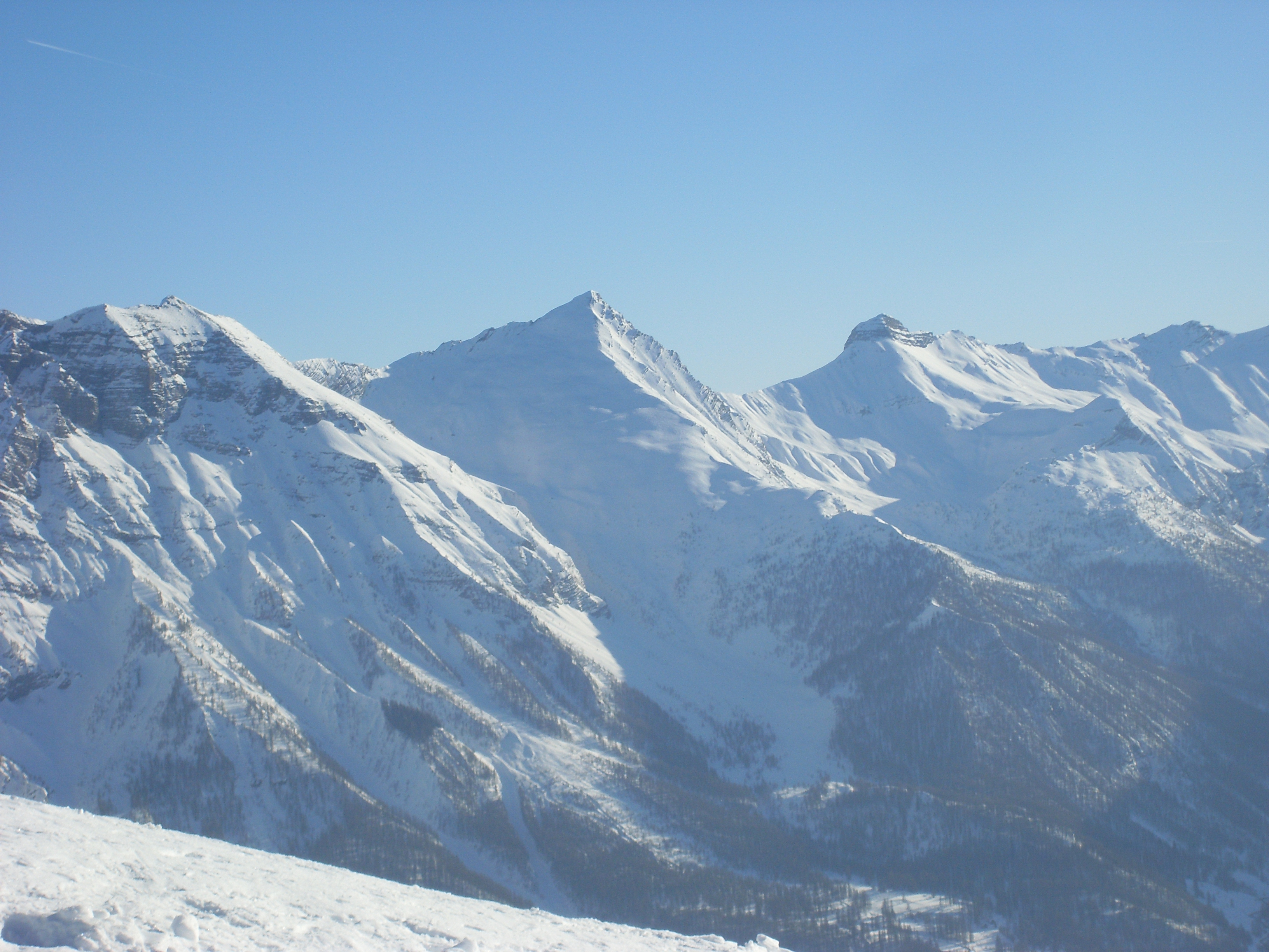 pistes d'orcières-merlette